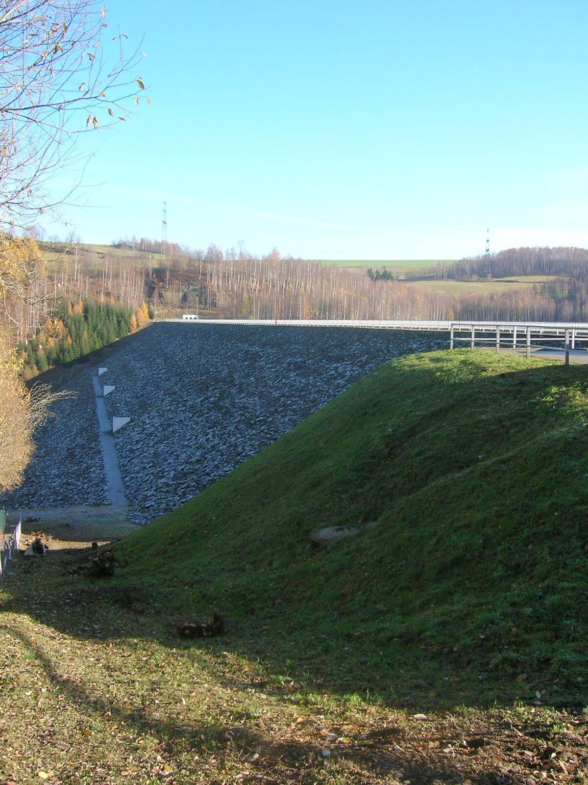 Pumpspeicherwerk Markersbach, Talsperre (Unterbecken) - Staumauer